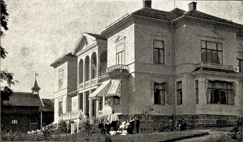 Storgården Østerhaug i Elverum kommune i Hedmark, Norge